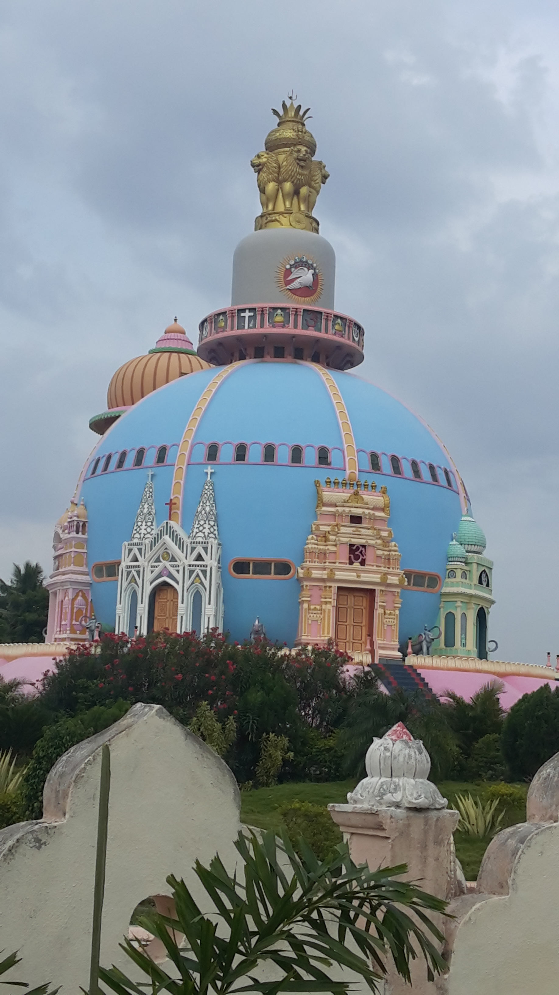 Viswanagar in Guntur district